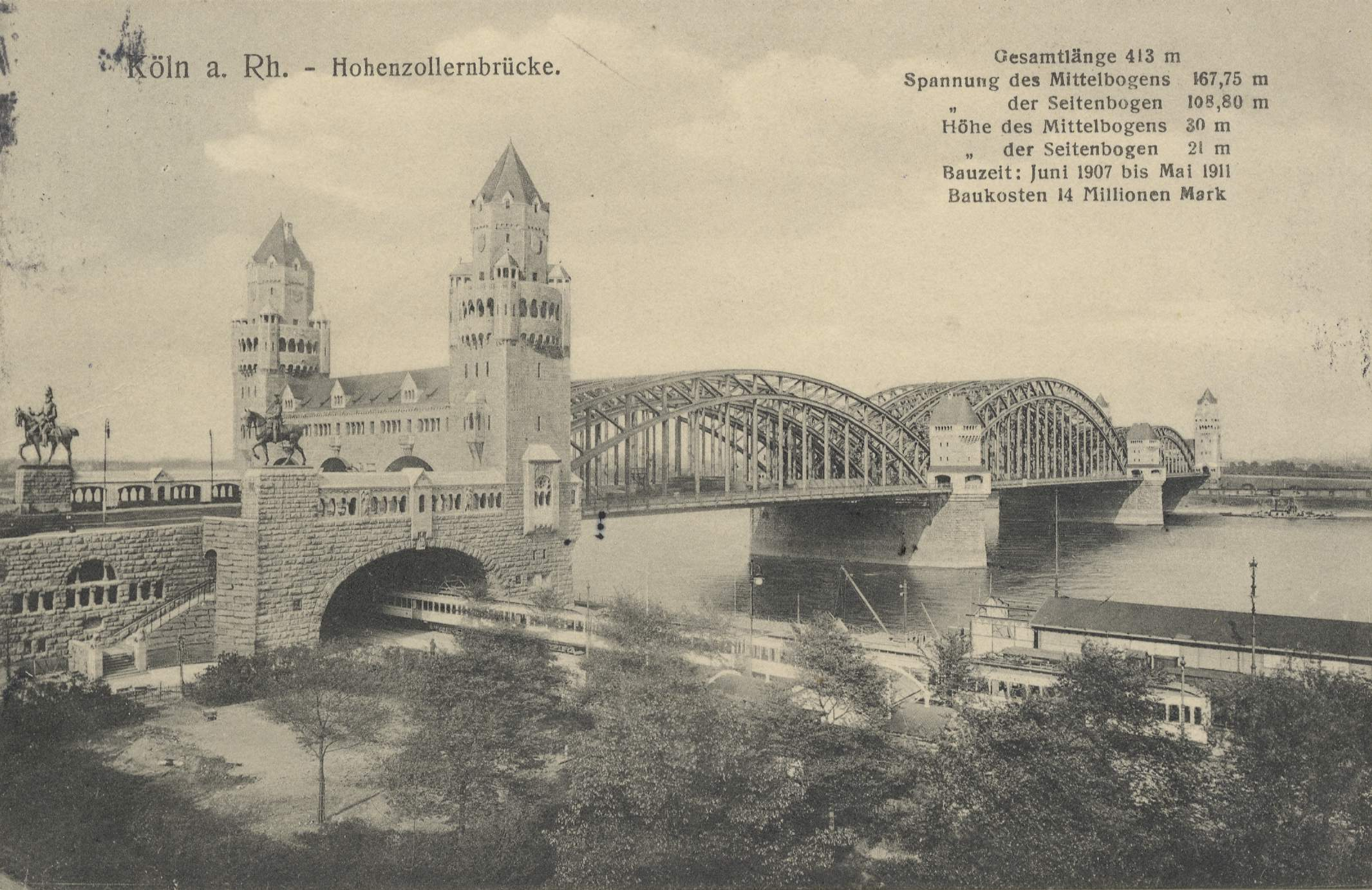 Hohenzollernbrücke